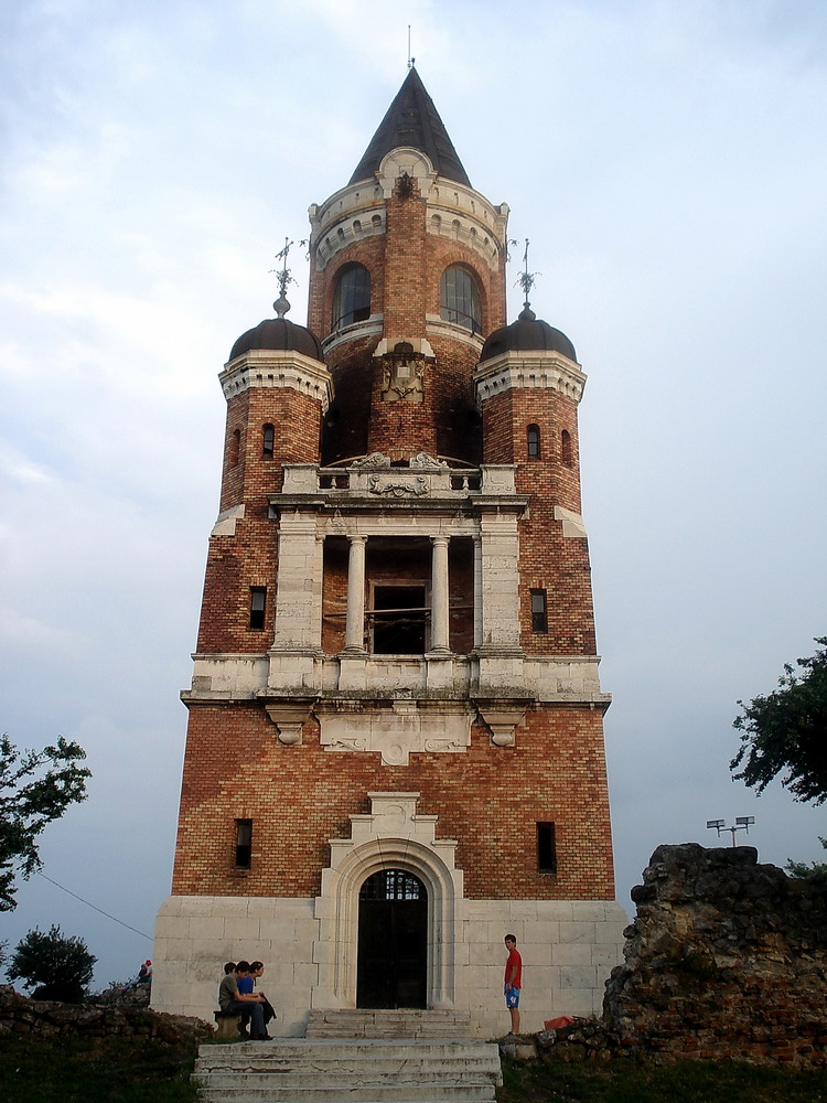 Gardoš. Zemun. Postavljeno za foto-konkurs